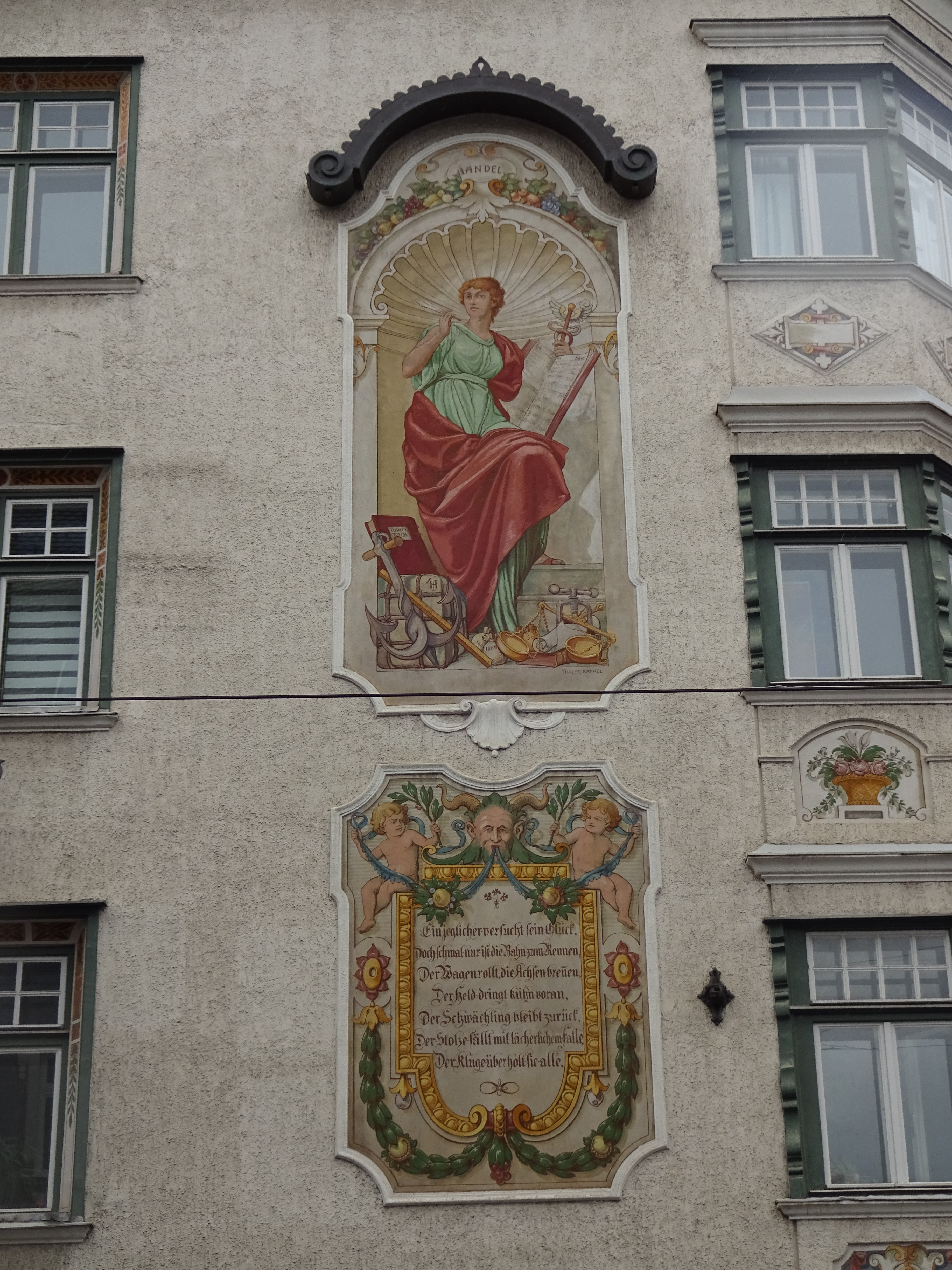 Haus Pradler Str. 38, Südfassade zur Defreggerstraße, Fassadenmalereien von Rafael Thaler: Personifikation des Handels und Zitat aus Schillers Gedicht "Das Spiel des Lebens" This media shows the remarkable cultural object in the Austrian state of Tyrol listed by the Tyrolean Art Cadastre with the ID 74309. (on tirisMaps, pdf, more images on Commons, Wikidata)